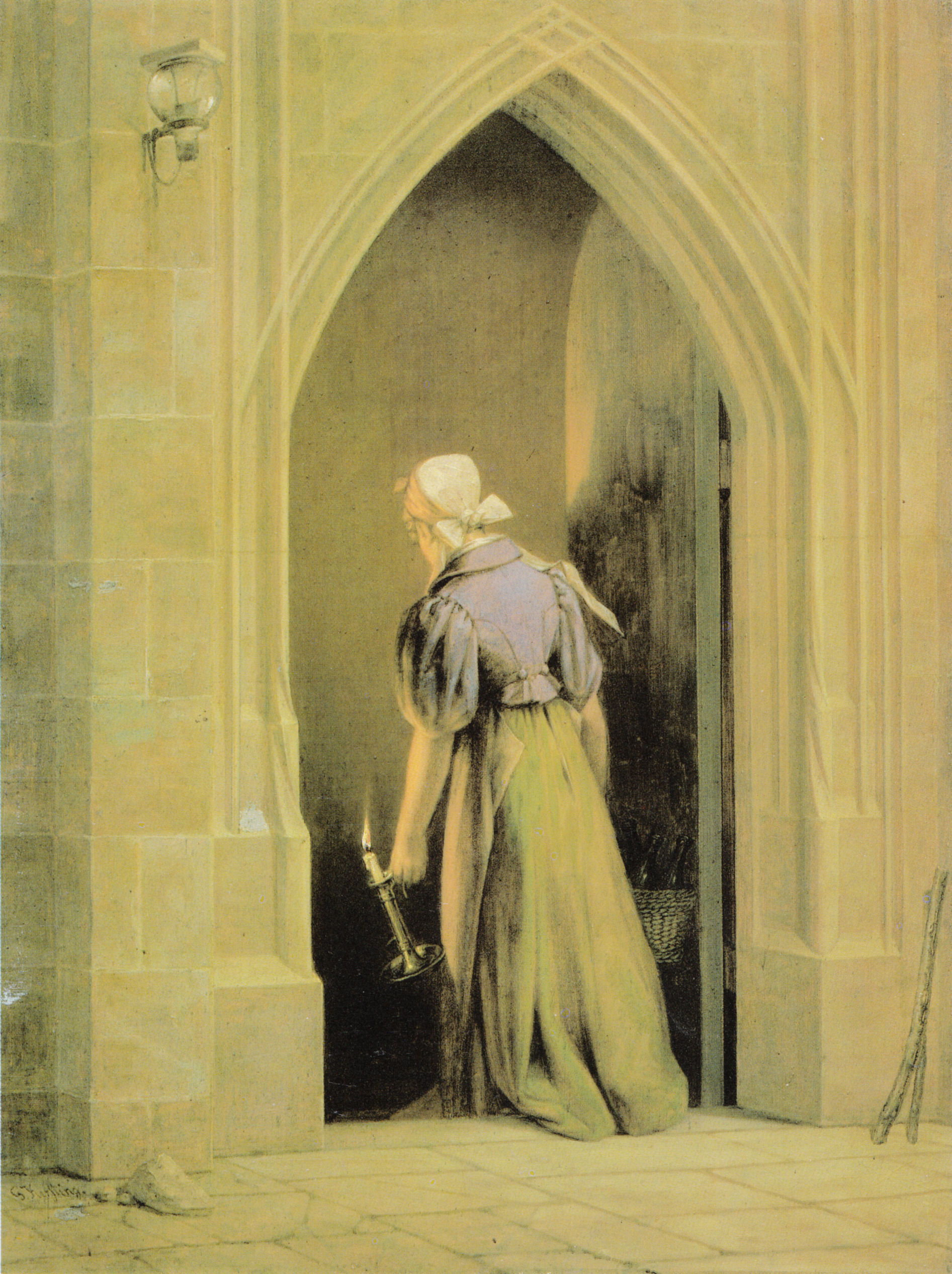 Genreszene aus der Albrechtsburg, in der seinerzeit die Porzellanmanufaktur untergebracht war.